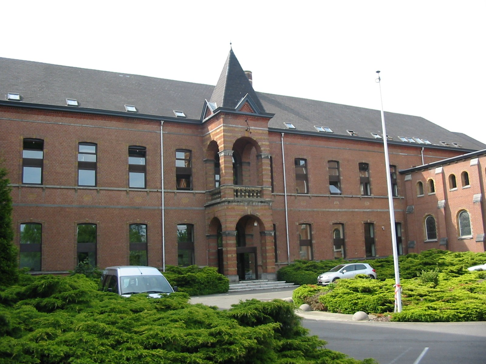 Lemmensinstituut Leuven